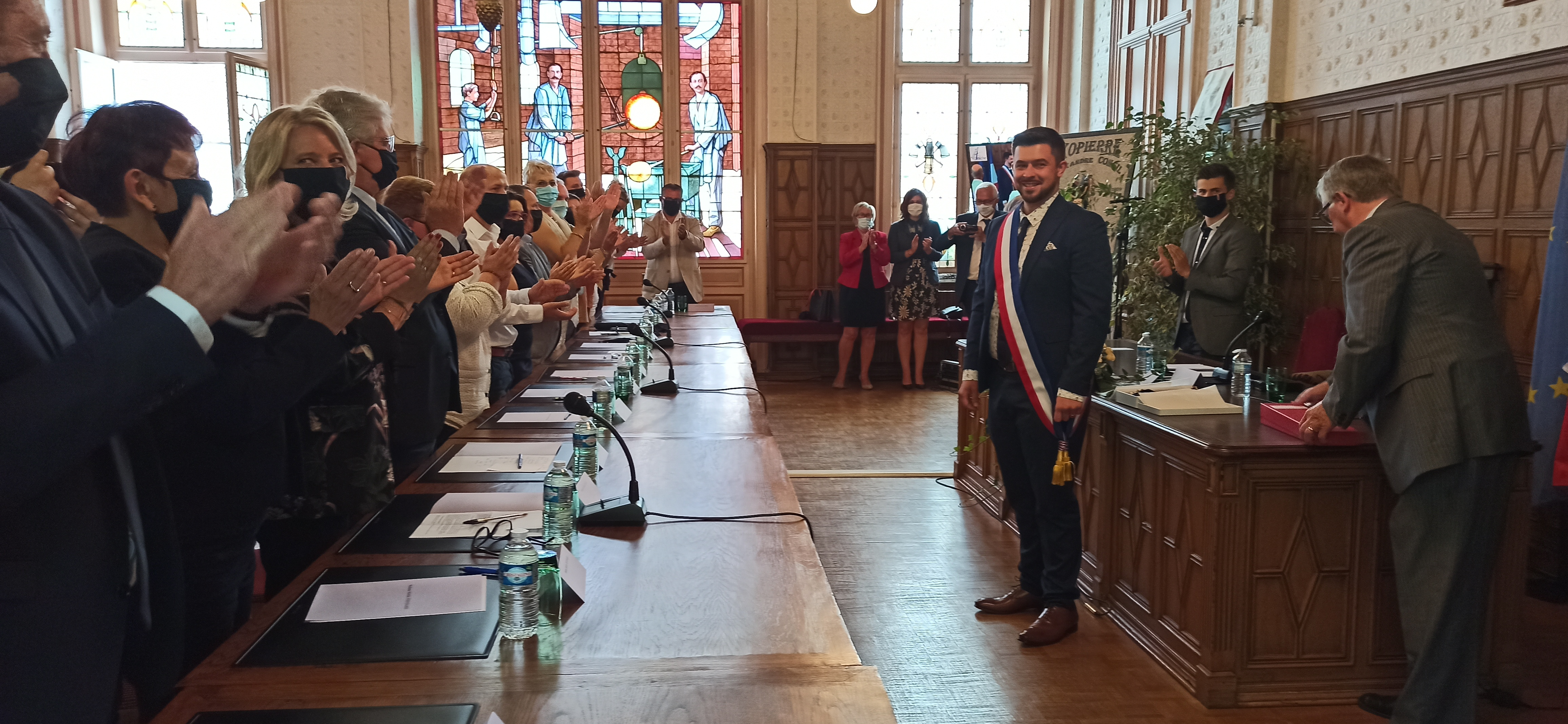 Xavier Bartoszek, élu maire le 04 juillet 2020 lors du conseil municipal d'investiture en salle des conseils par 25 voies contre 8 nuls